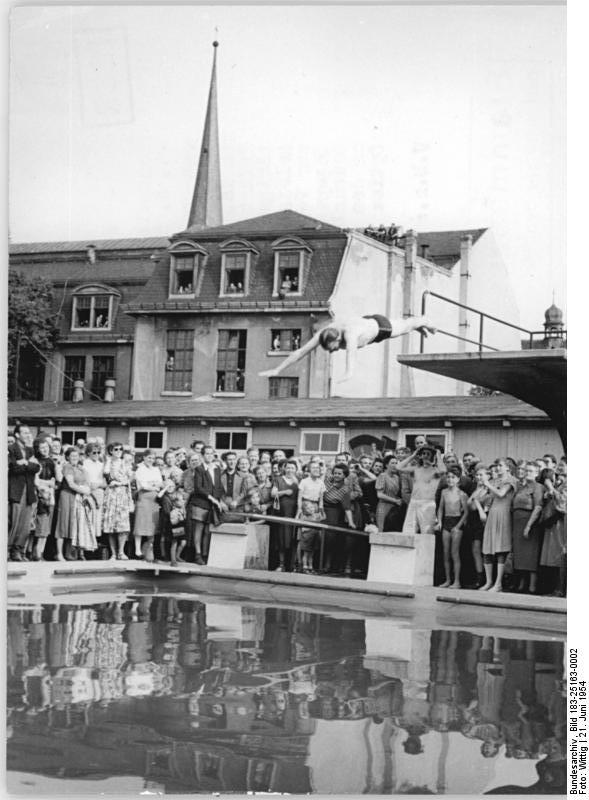 Zentralbild TBD-Wittig - 2307 21.6.1954 VEB Optima erhielt Schwimmbad. Am 18. Juni 1954 konnte die Belegschaft des VEB Optima Erfurt ihr neues Schwimmbad in Betrieb nehmen. Die Werktätigen hatten beim Bau des Bades viele Aufbaustunden geleistet. 30.000 DM stellte der Betrieb für den Bau zur Verfügung. Jetzt können die Werktätigen in der Mittagspause und nach Feierabend in dieser schönen Freibadeanlage Wassersport treiben. Besondere Freude hat an dem neuen Bad die Betriebssportgemeinschaft Motor Optima Erfurt. UBz: Das Freibad im VEB Optima am Eröffnungstag.